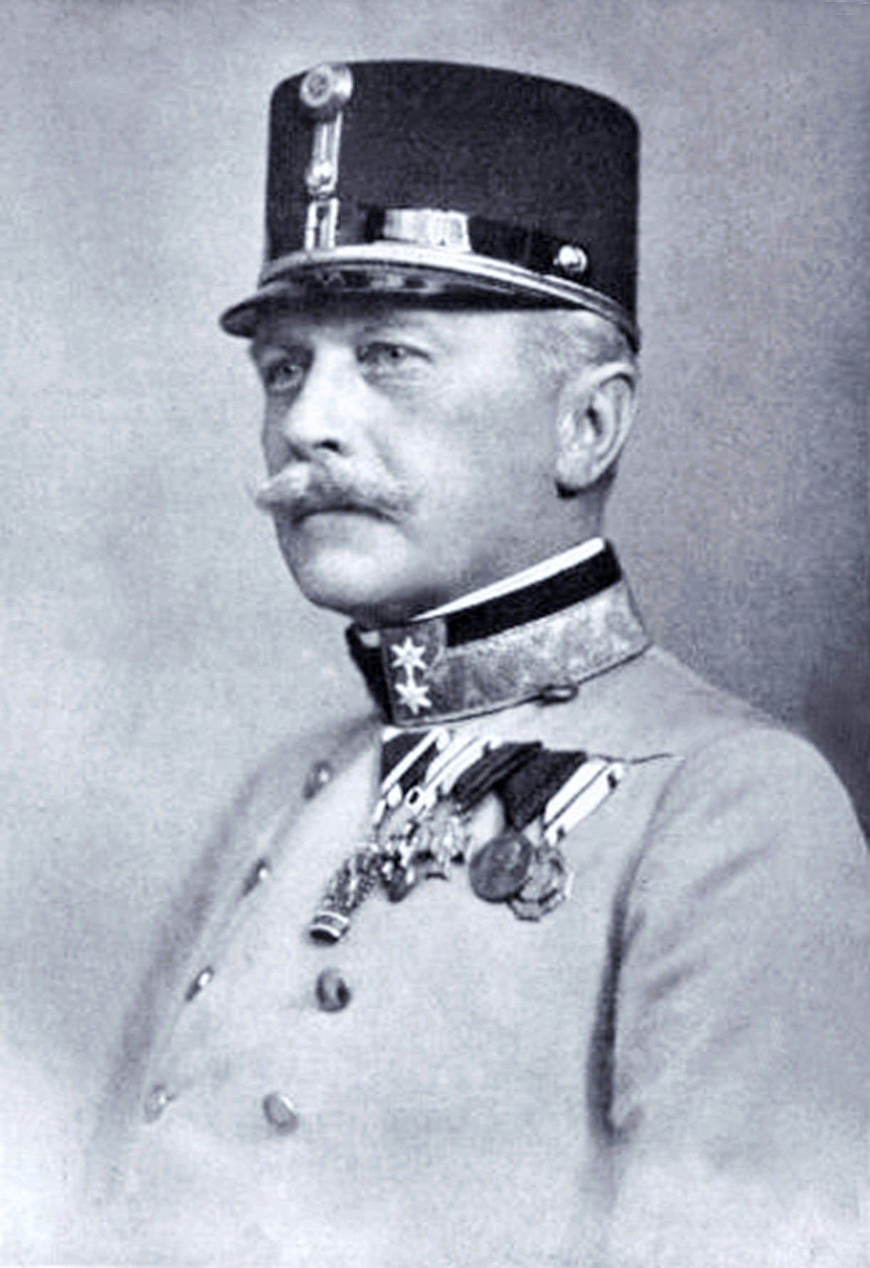 Georg von Lehmann als FML, 1913